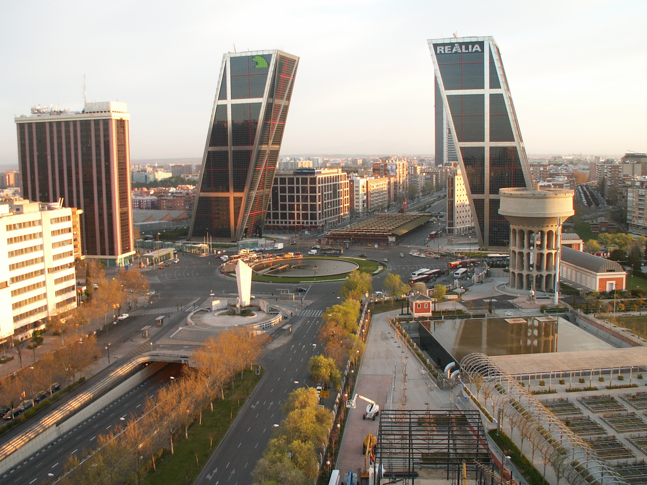 Panorámica del Paseo de la Castellana, las torres Puerta de Europa y Plaza de Castilla